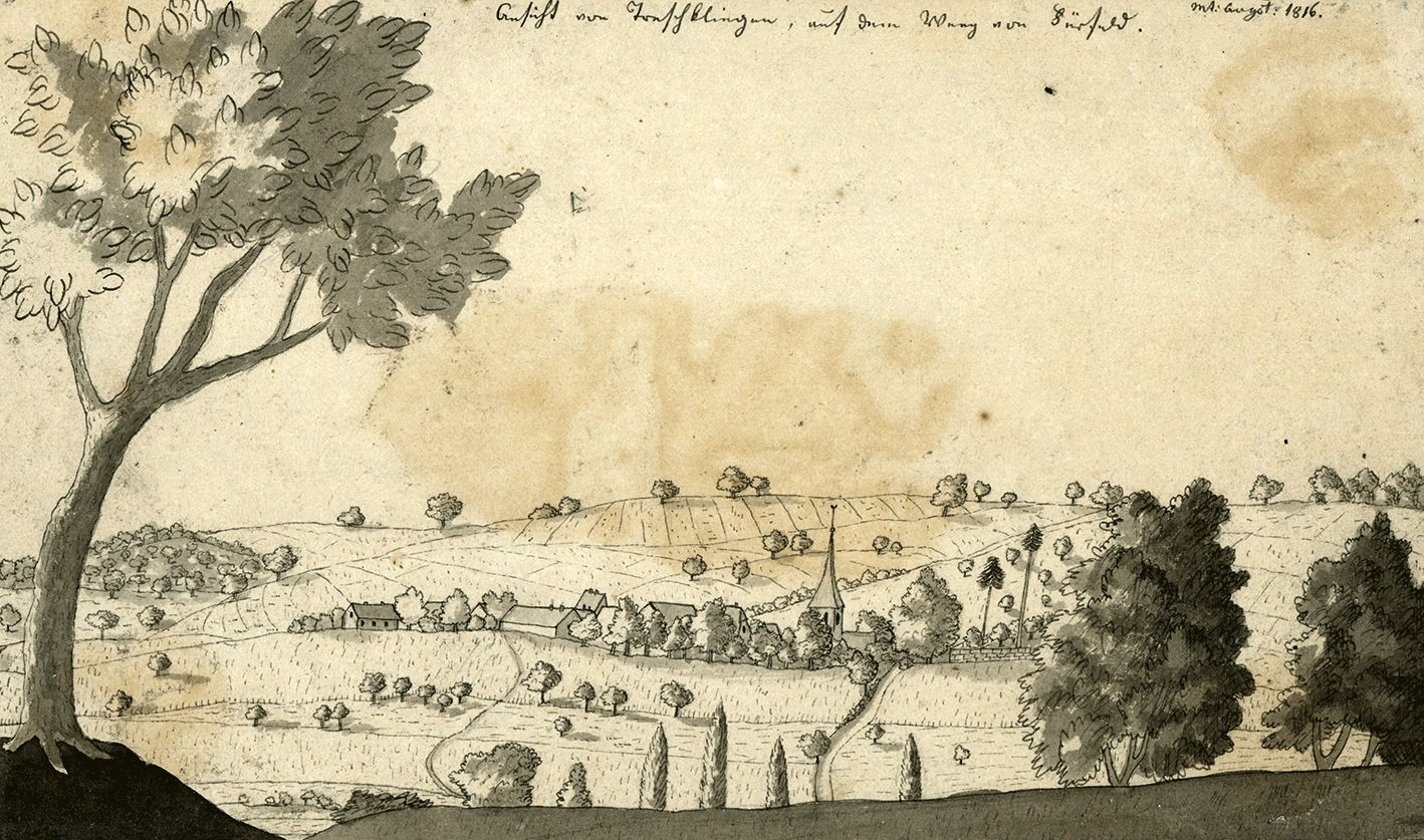 Ansicht von Treschklingen, Louis von Yelin 1816